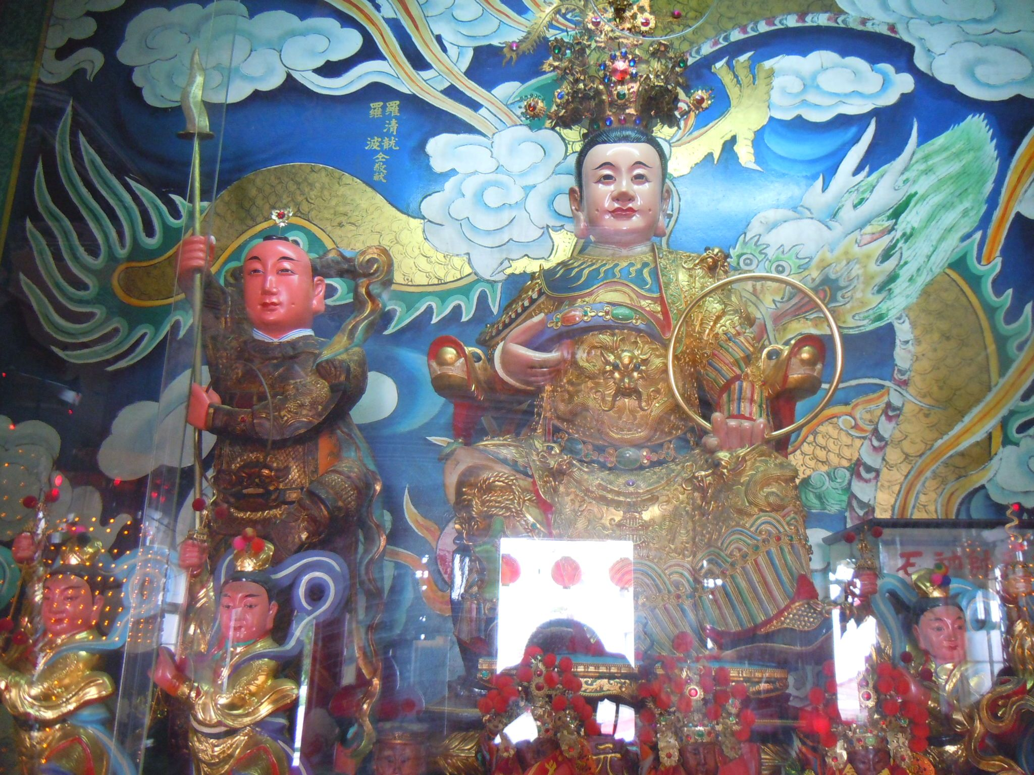 太子元帥統領「東營九夷軍」、「南營八蠻軍」、「西營六戎軍」、「北營五狄軍」、「中壇三秦軍」。